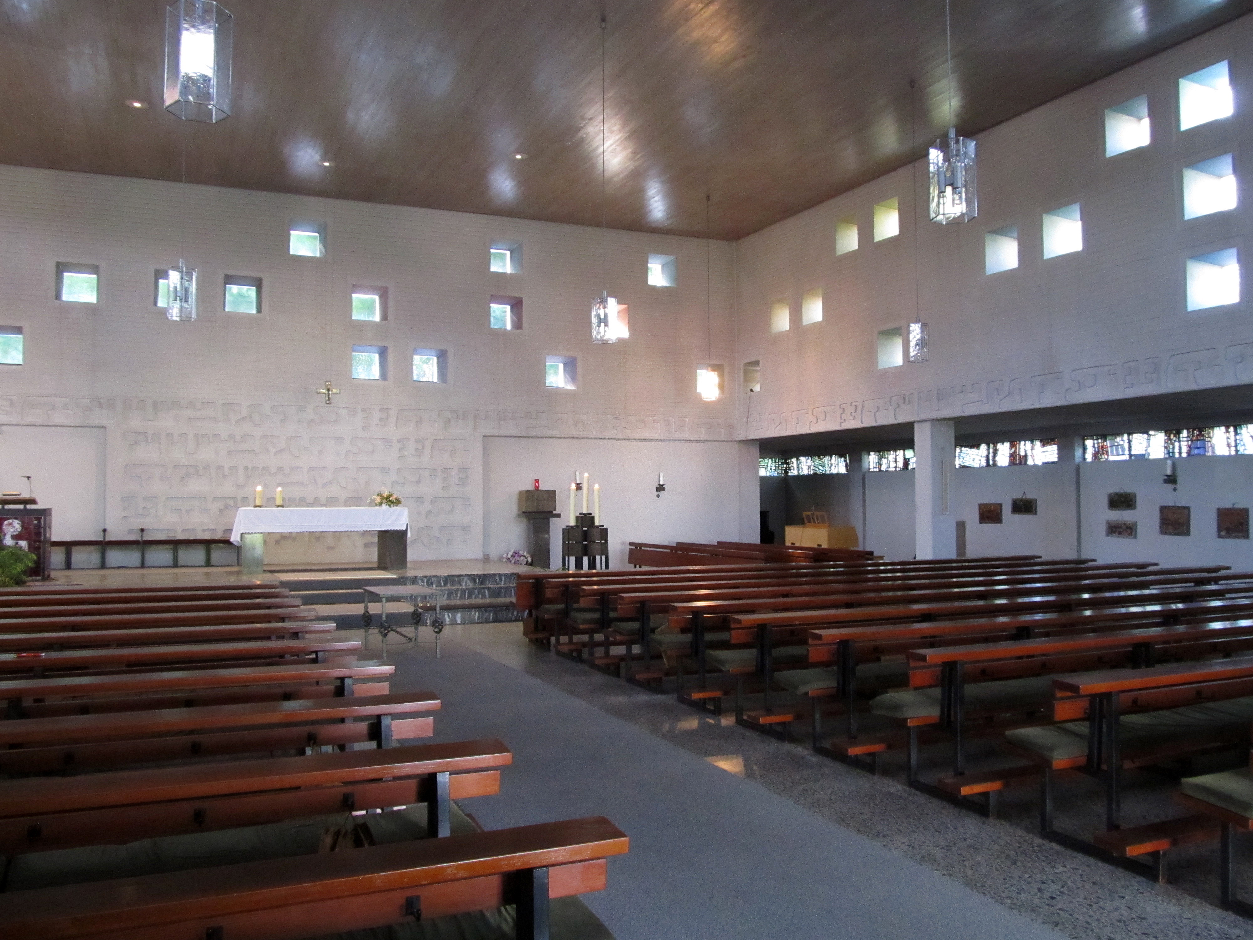 Blick ins Innere der katholischen Kirche Mariä Geburt in Schwarzenacker, einem Stadtteil von Homburg, Saarland